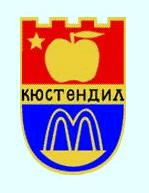 Герб на кюстендил 1960 г.